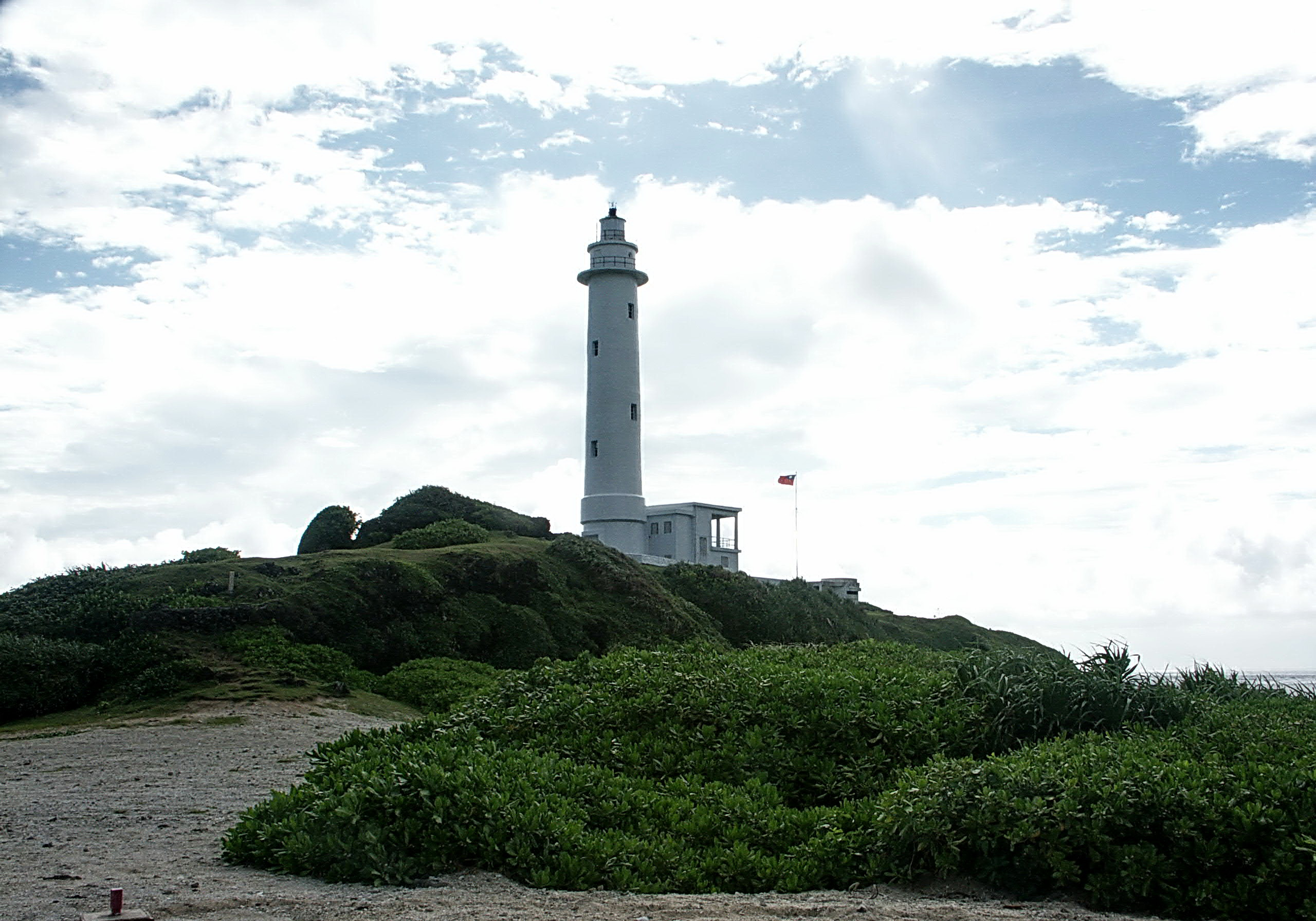 綠島燈塔。